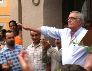 Manuel Jesús González Capón político galego do PPdeG e alcalde de Baralla.